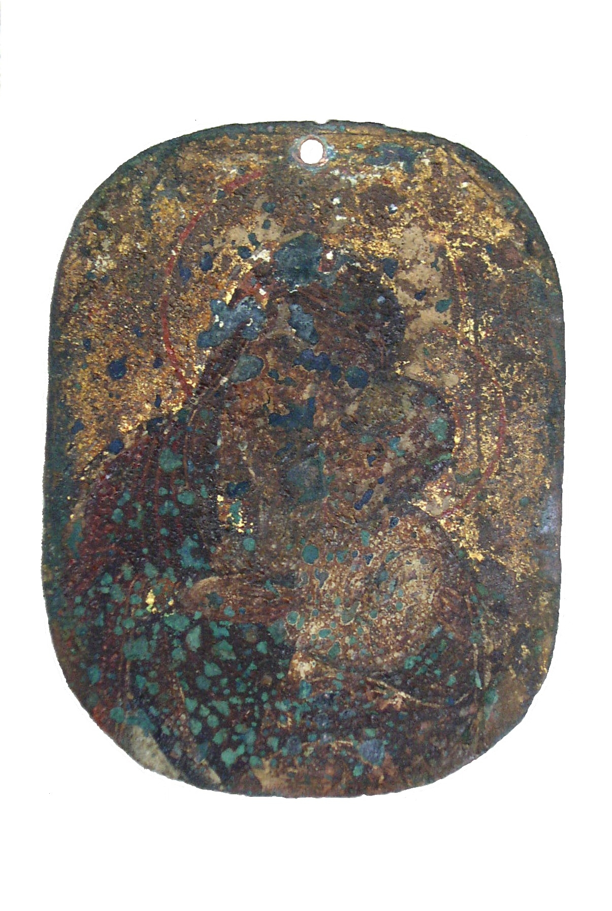 Ікона Богородиця з Немовлям, майстерня Києво-Печерської Лаври, автор невідомий, ХVІІ - початок ХVІІІ ст.